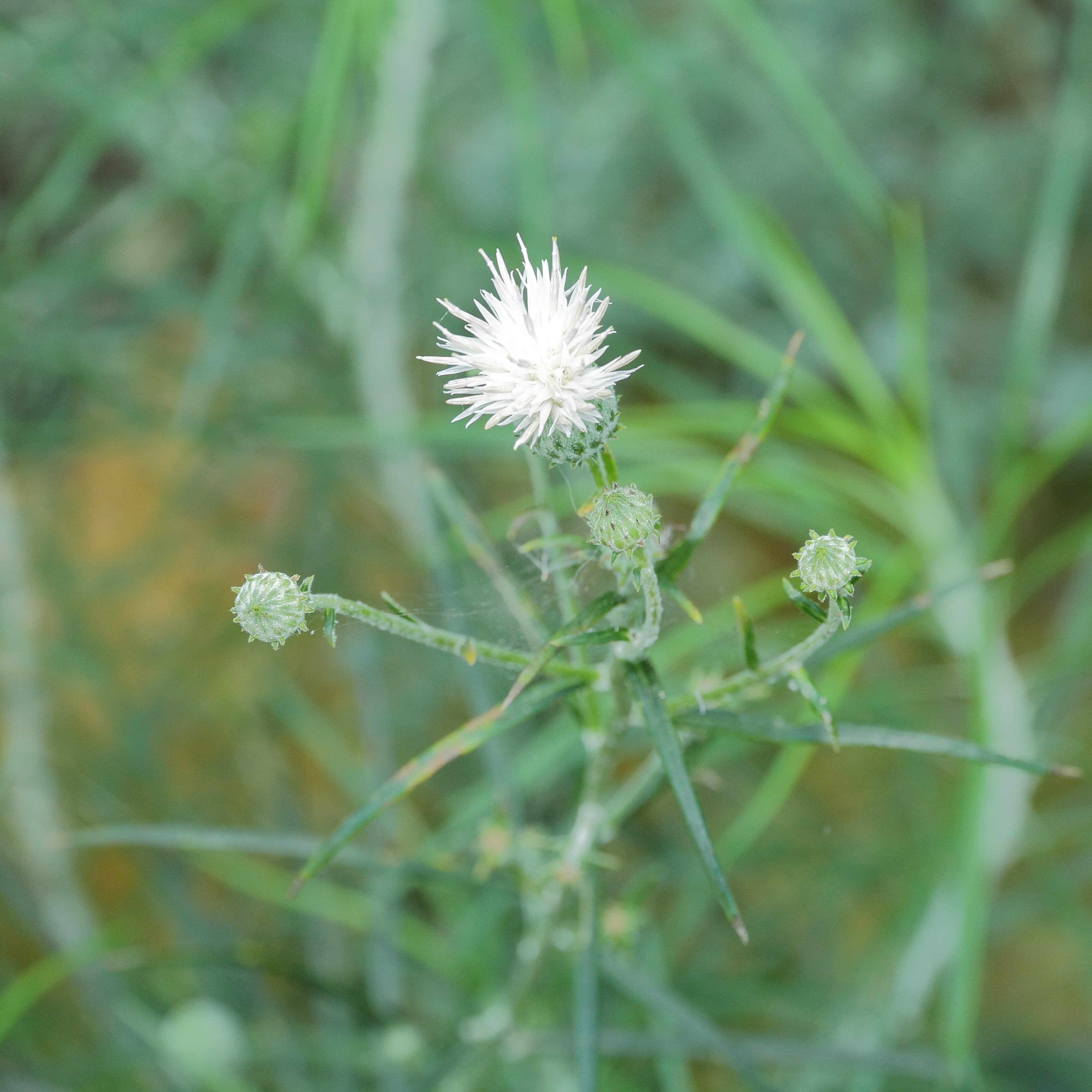 Ptilostemon chamaepeuce i Bergianska trädgården.